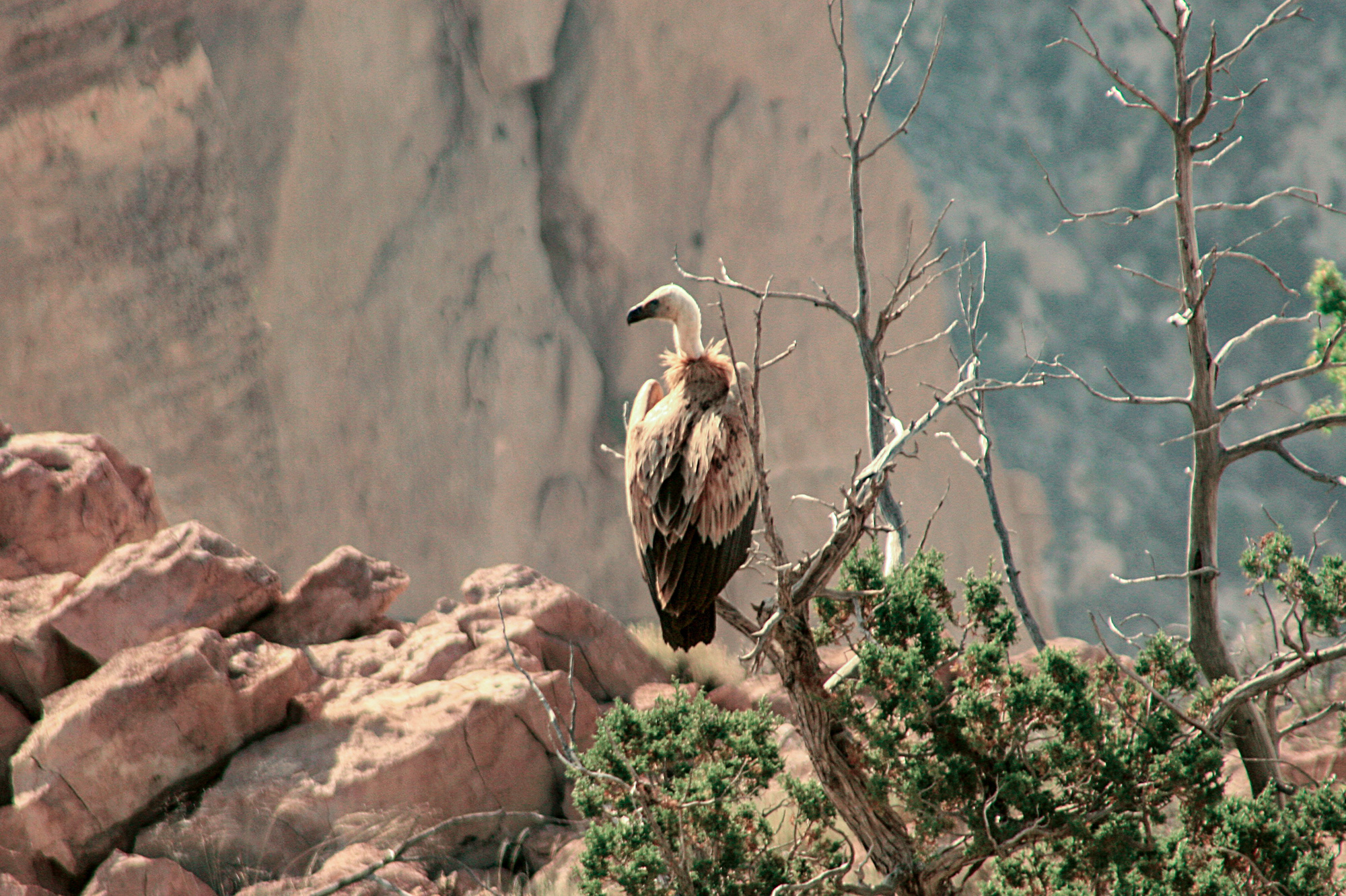 هما (مرغ استخوان‌خوار) در ارتفاعات منطقه حفاظت‌شده گنو